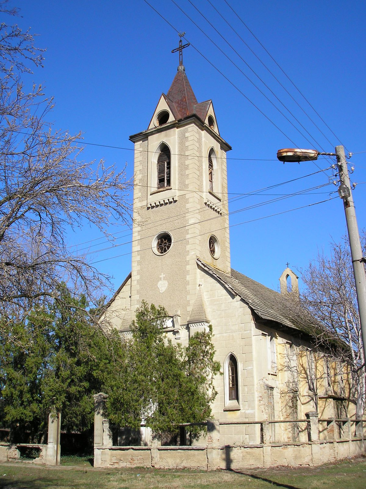 German church in Bardarski Geran